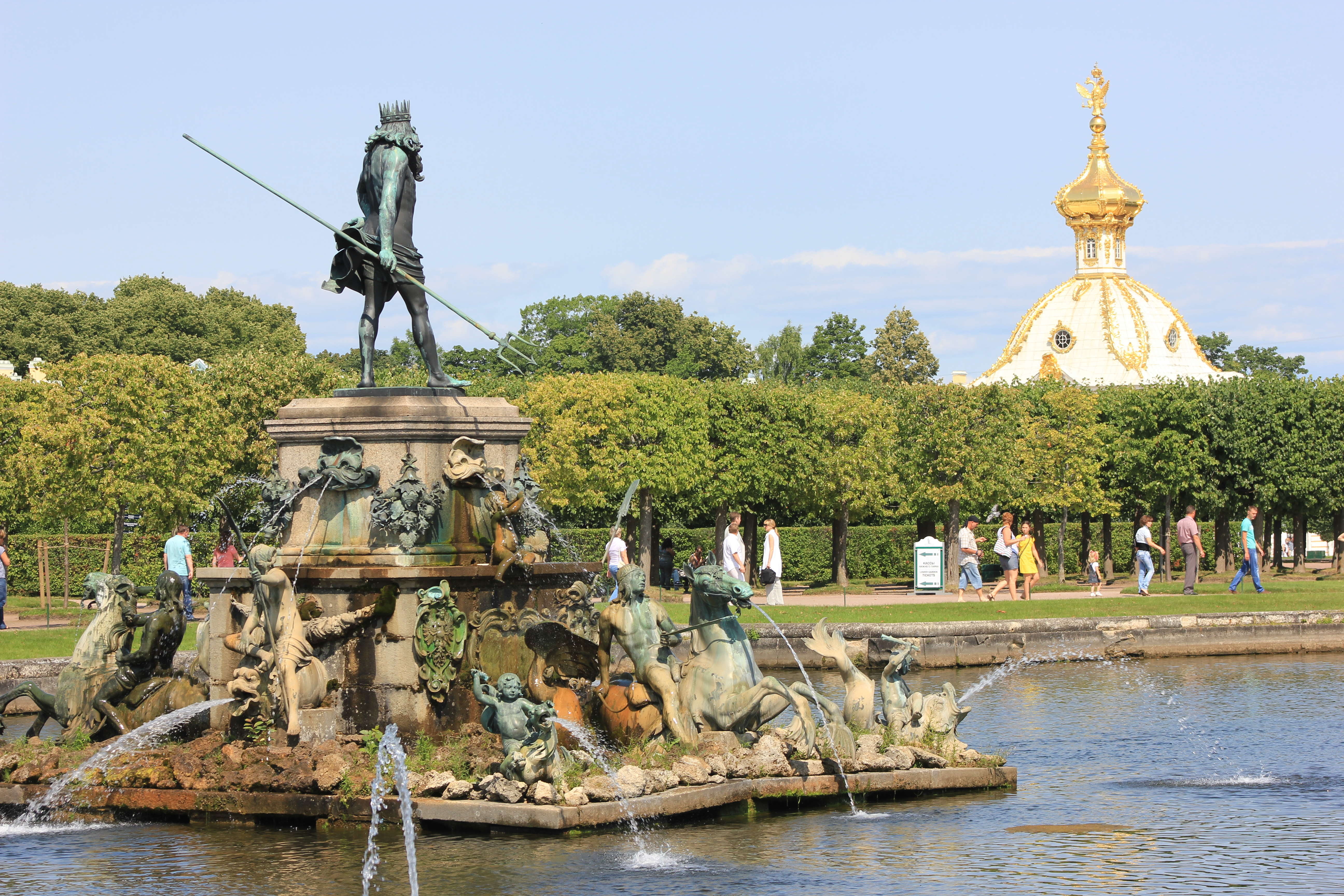 Петерго́ф (нидерл. Peterhof, «двор Петра») — дворцово-парковый ансамбль на южном берегу Финского залива в 29 км от Санкт-Петербурга. Находится на территории города Петергоф (с 1944 года по 1997 год [1] — Петродворец). От него происходит название Петергофской дороги. Часть его находится в ведении Государственного музея-заповедника «Петергоф». Петергоф включает в себя несколько дворцово-парковых ансамблей, формировавшихся на протяжении двух веков. Нижний парк, Верхний сад и Английский парк — ансамбли, получившие развитие в XVIII веке; Александрия, Колонистский парк, Луговой парк, Александровский парк, Сергиевка, Собственная дача — ансамбли XIX века.